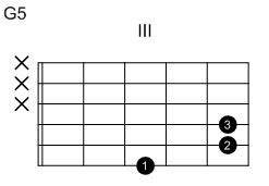 Eigenanfertigung